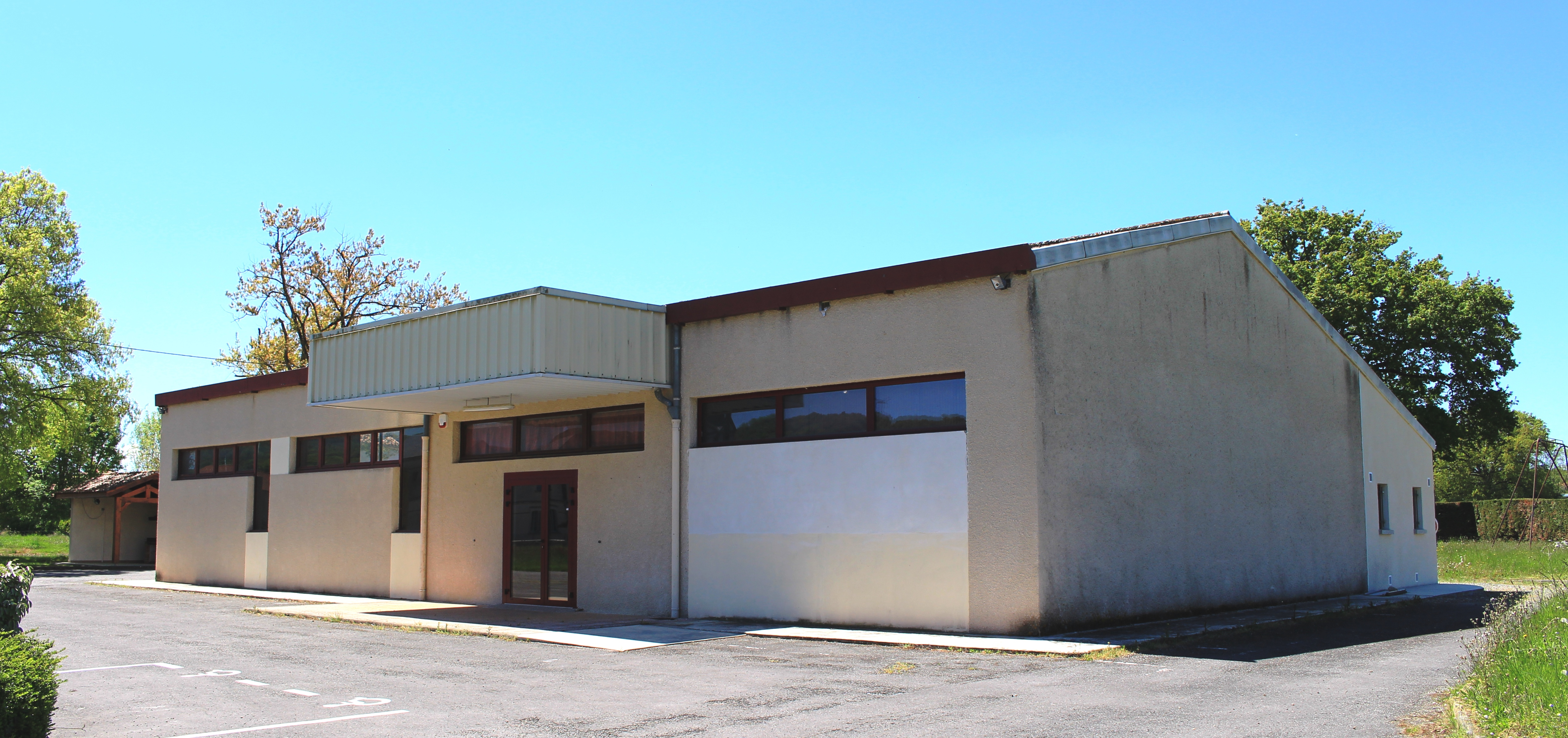 Salle des fêtes de Tournous-Darré (Hautes-Pyrénées)